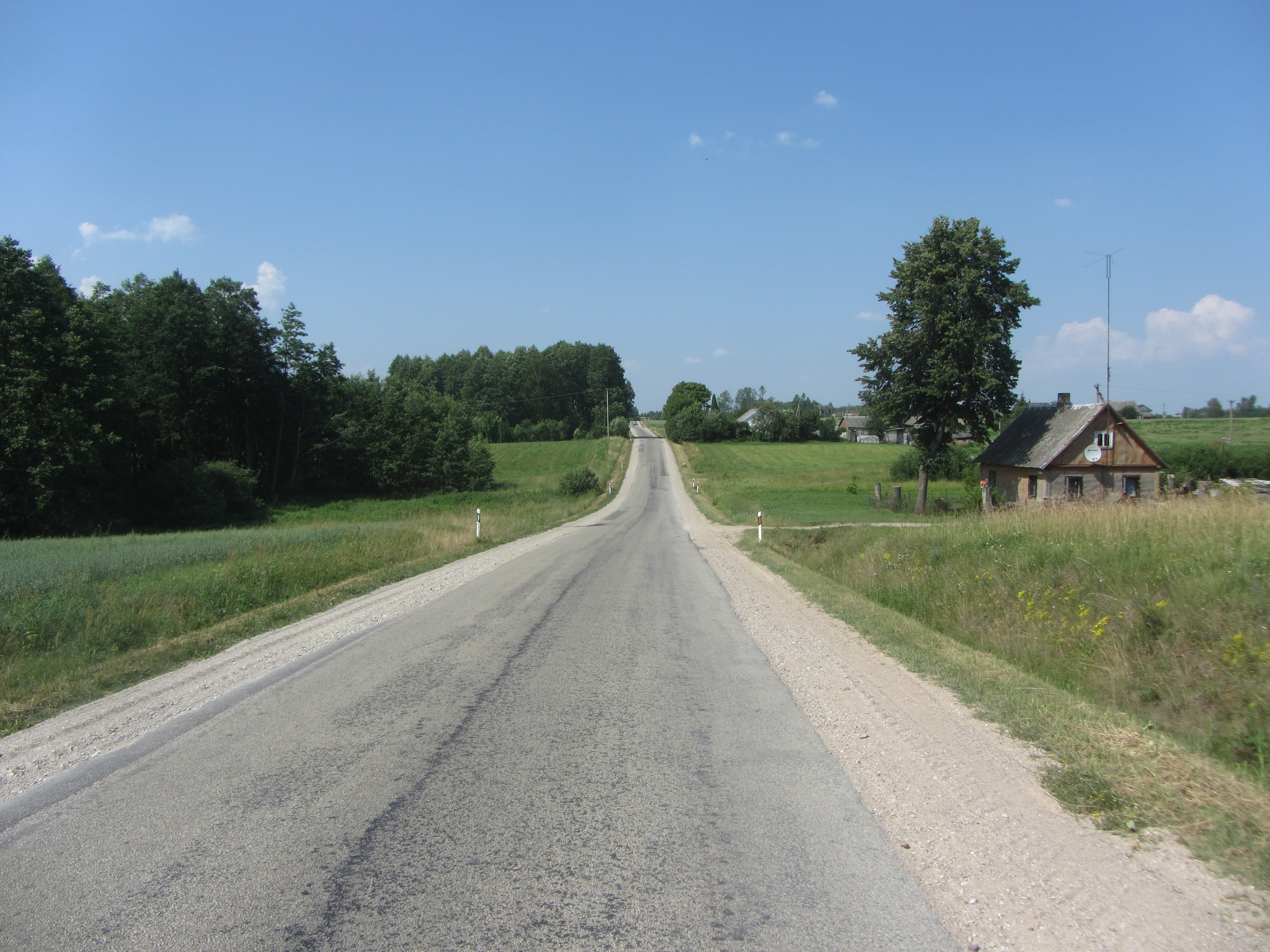 Simno sen., Lithuania